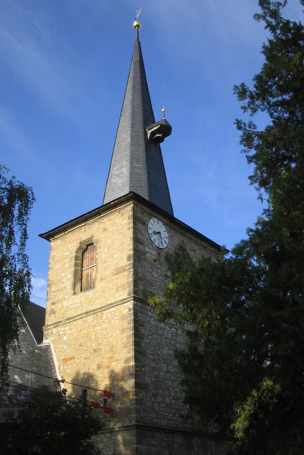 Kirchturm der Ollendorfer Kirche Philippus und Jakobus